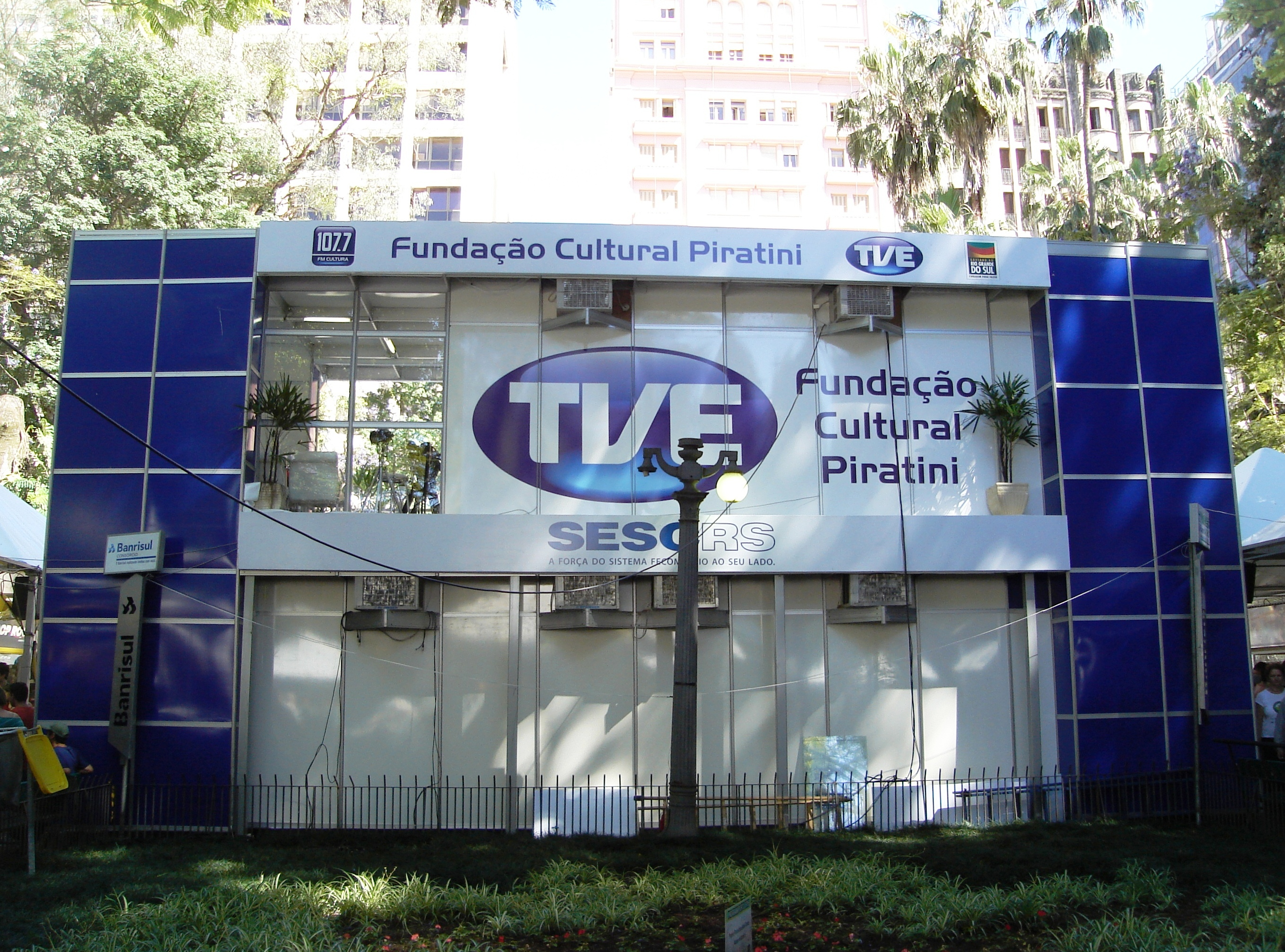 Estúdios da TVE-RS na Feira do Livro de Porto Alegre, RS.